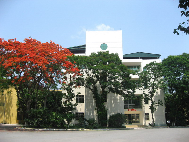 Viện Đào tạo Quốc tế về Khoa học vật liệu - ITIMS